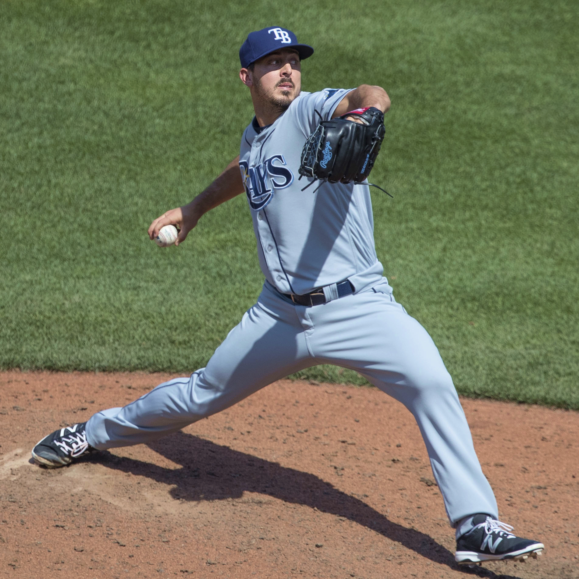 Ryan Garton